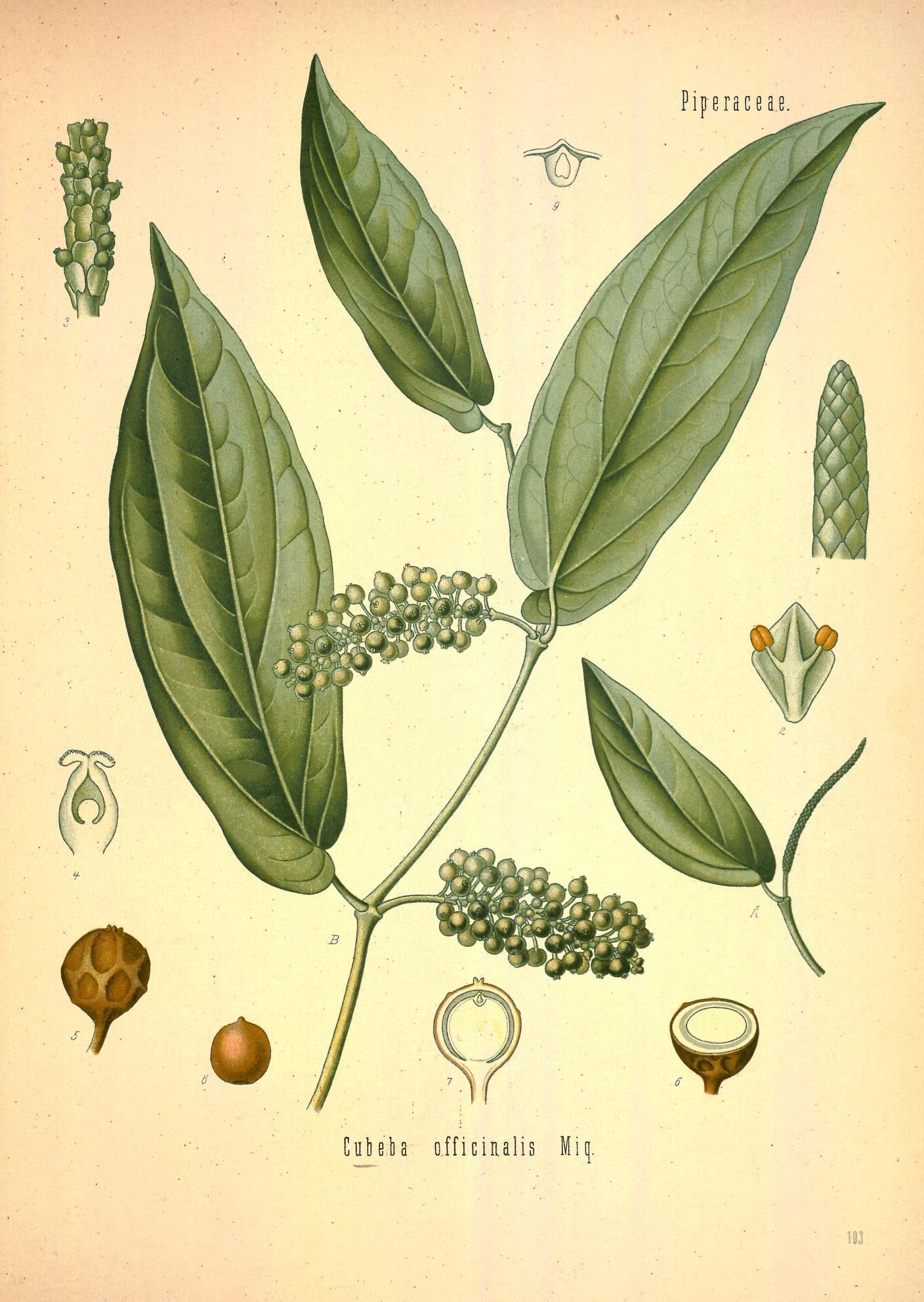 Kubeben-Pfeffer. A männlicher Blüthenzweig, natürl. Grösse; B Fruchtzweig, desgl.; 1 oberer Theil der männlichen Blüthenähre, vergrössert; 2 männliche Blüthe mit Deckblatt, desgl.; 3 Theil der Fruchtähre, desgl.; 4 Fruchtknoten im Längsschnitt, desgl.; 5 Frucht, desgl.; 6, 7 dieselbe im Quer- und Längsschnitt, desgl.; 8 Same, desgl.; 9 Scheitel des Samens mit dem Embryo.